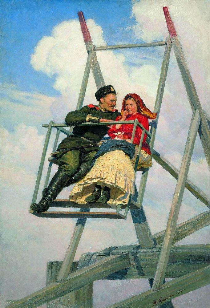 На качелях